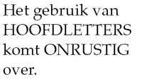 Voorbeeld van het gebruik van (te veel) hoofdletters. Lettertype: Palatino (Eigenlijk: URW Palladio), eigen werk.